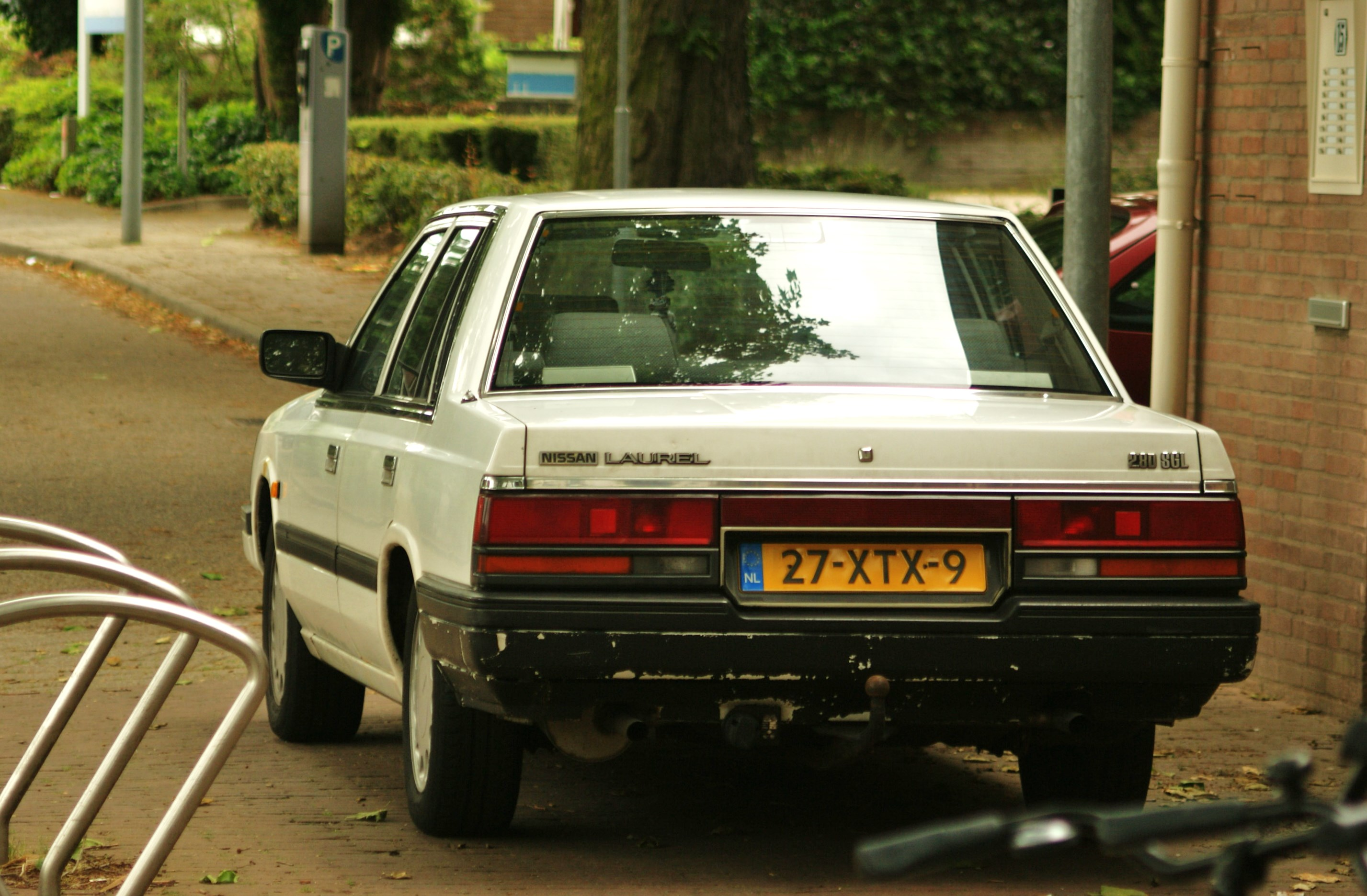 27-XTX-9